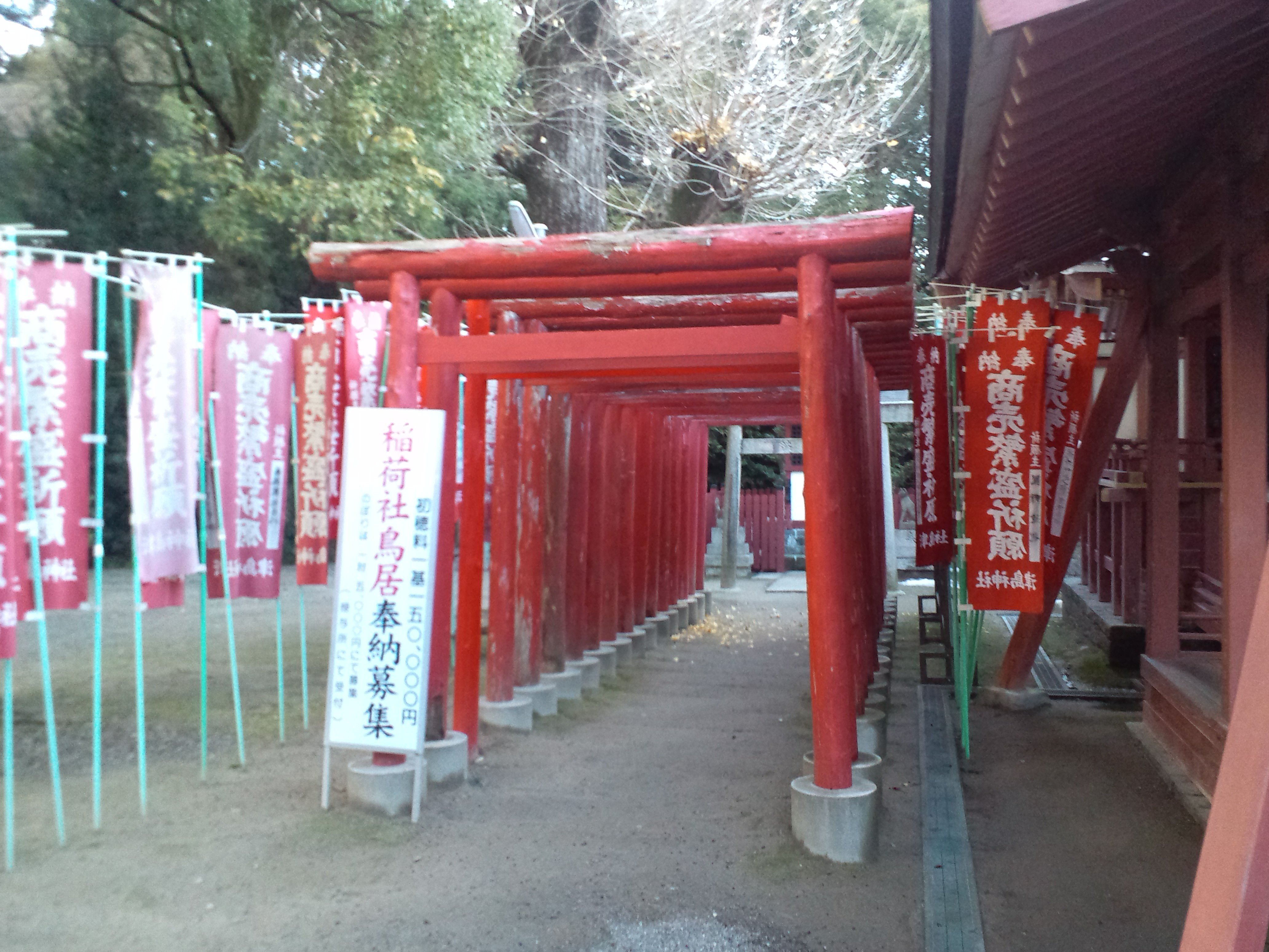 津島神社 稲荷社